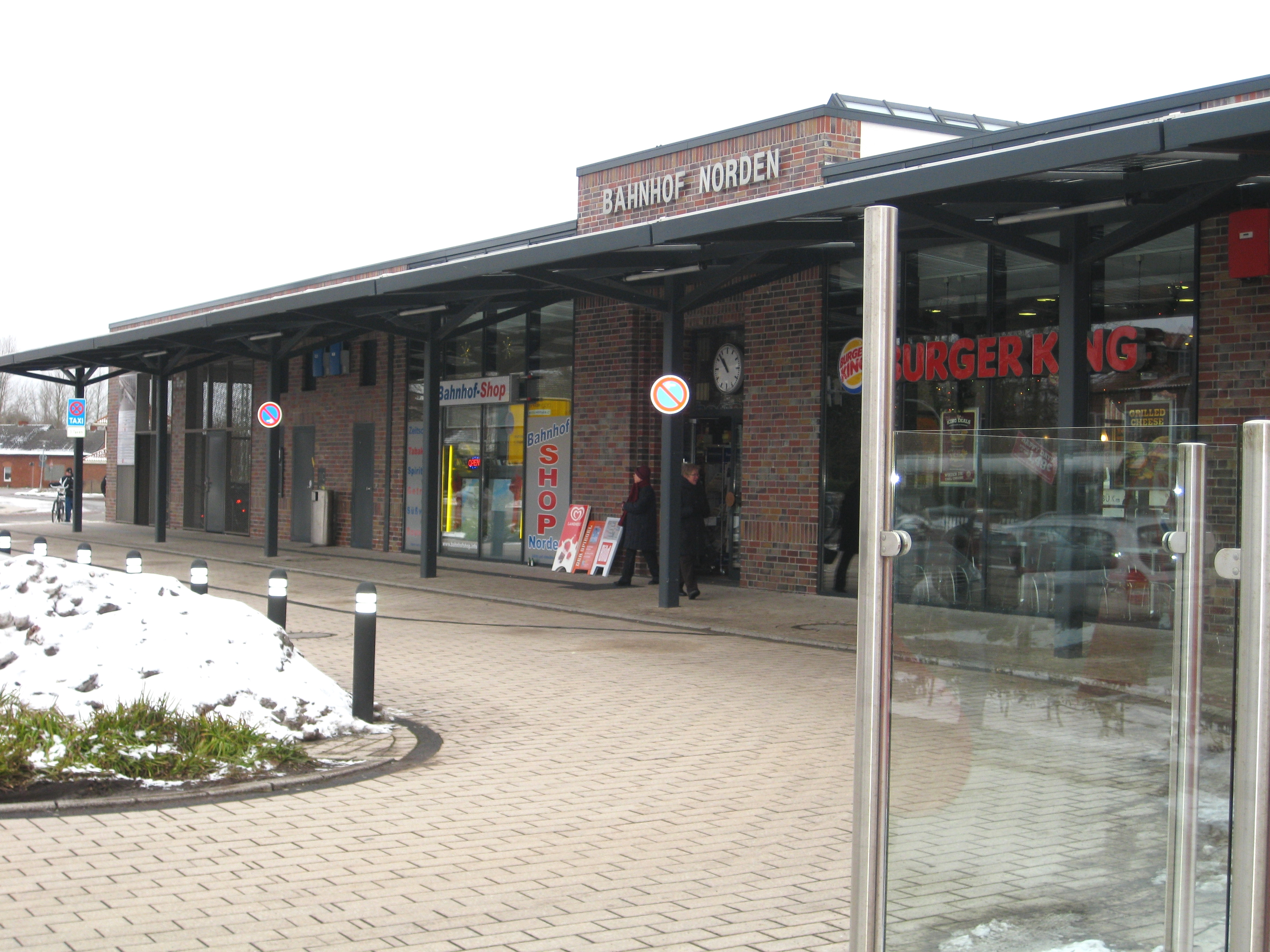 Eingangsbereich des Bahnhofs Norden